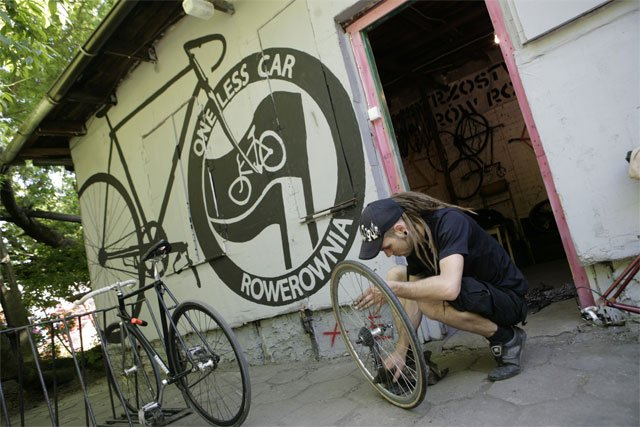 Zdjęcie ze strony skłotu Rozbrat. Za zgodą kolektywu.